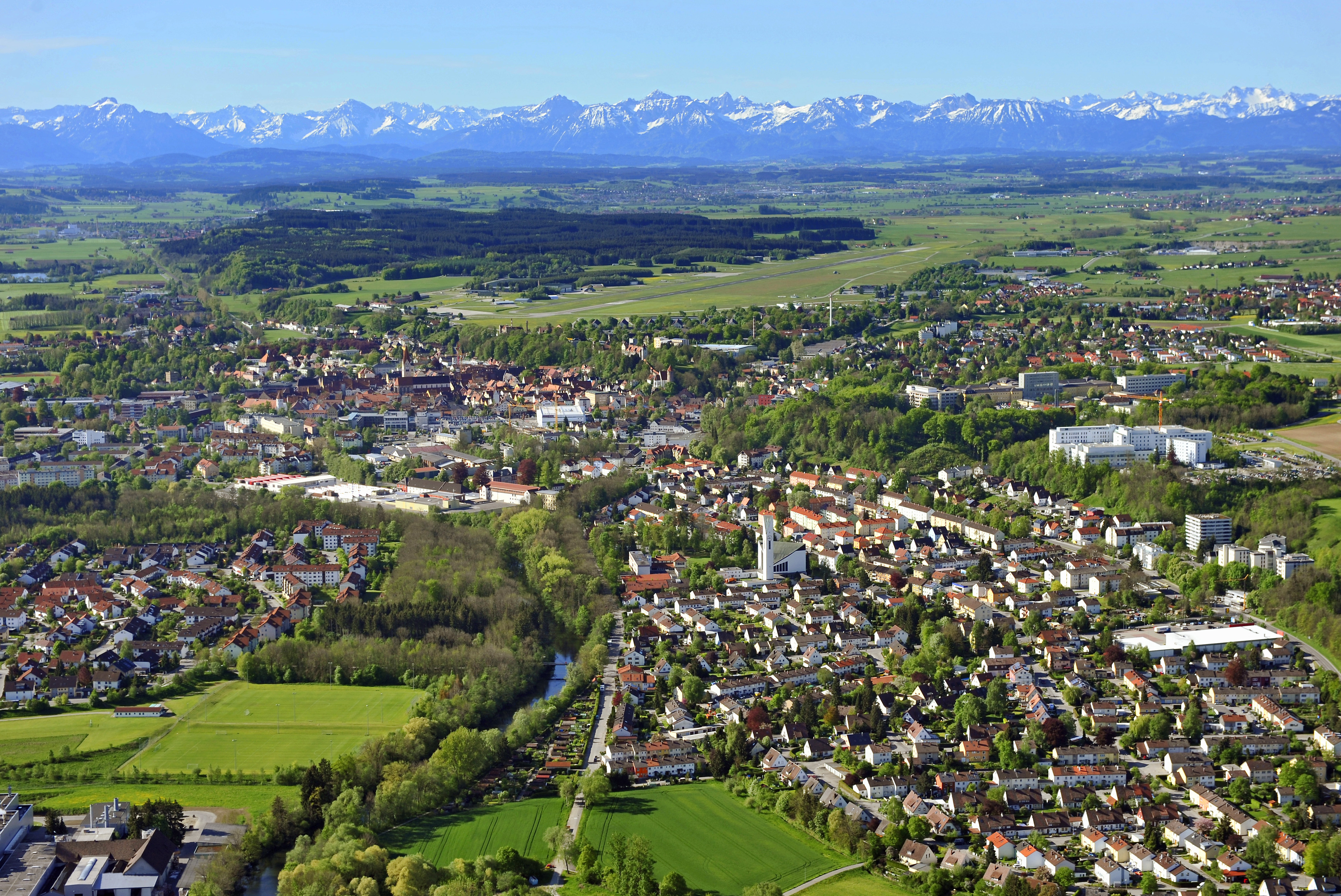 Kaufbeuren, Fliegerhorst und Krankenhaus